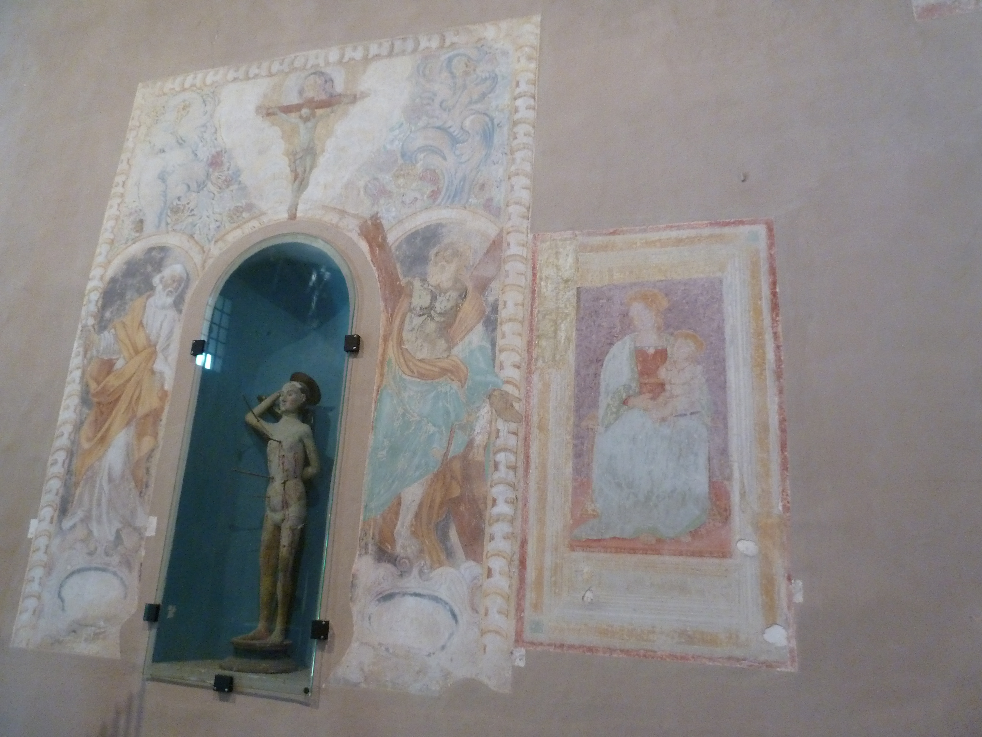 Vierge à l'Enfant (1526), fresques, Statuette en bois de saint Sébastien, artistes anonymes église Santa Maria Annunziata (paroi de gauche)-Fontignano